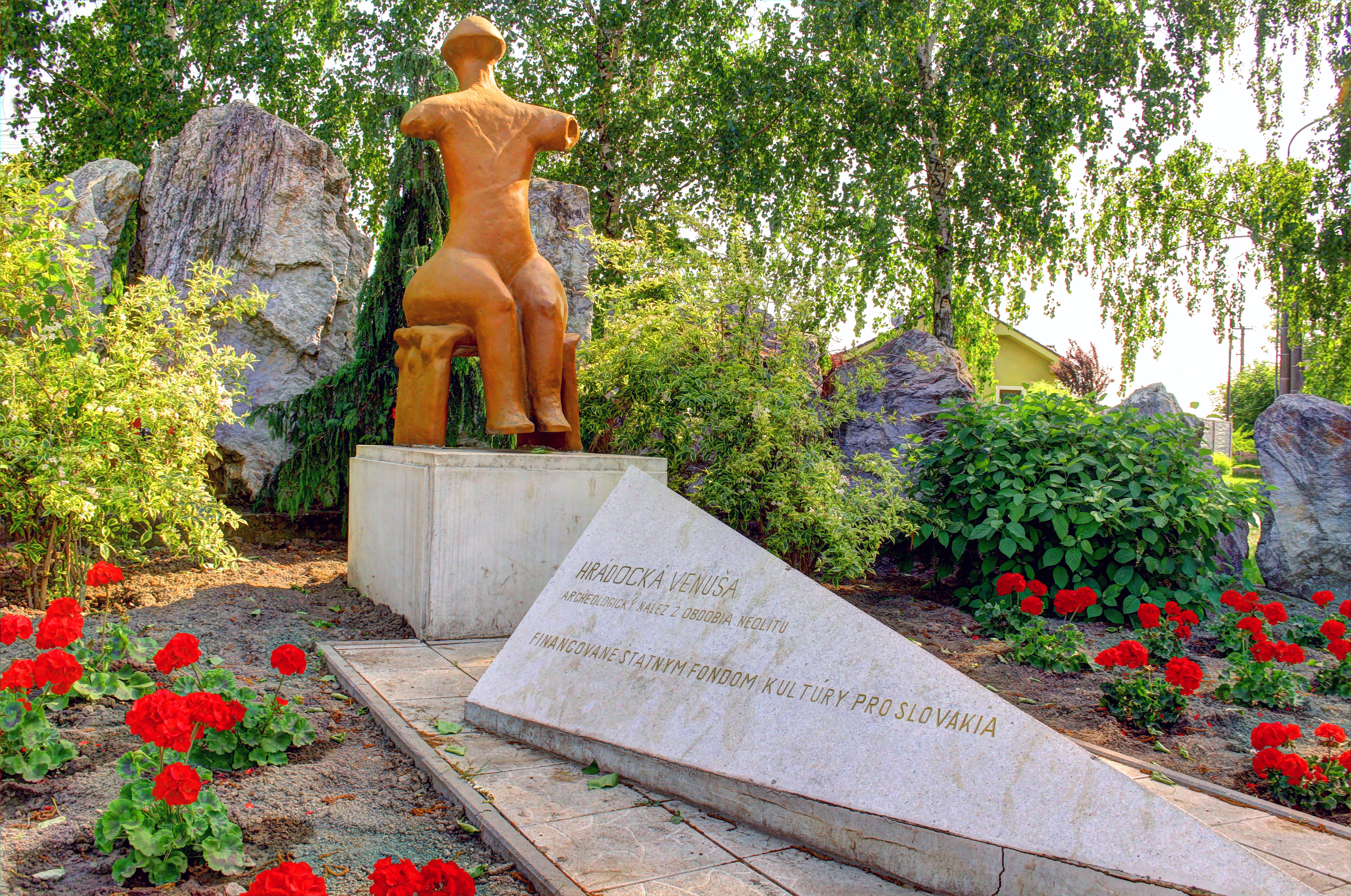 pamätník nálezu sošky Hrádockej Venuši